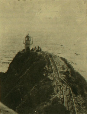 Faro Rapper, foto publicada en 1916